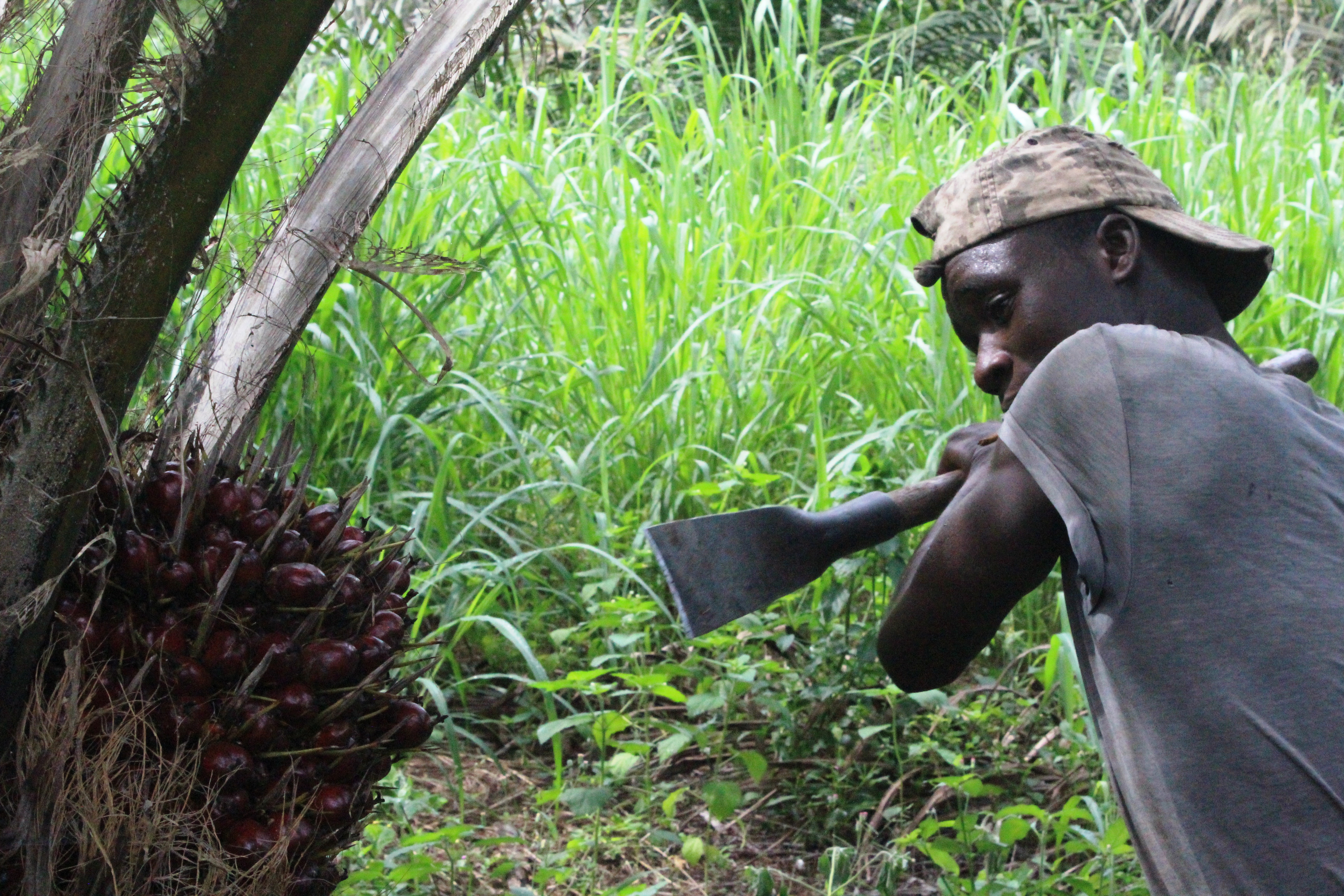 Cueillette de régime de palme à l'aide d'un ciseau large émmanché. This is an image of "African people at work" from Ivory Coast